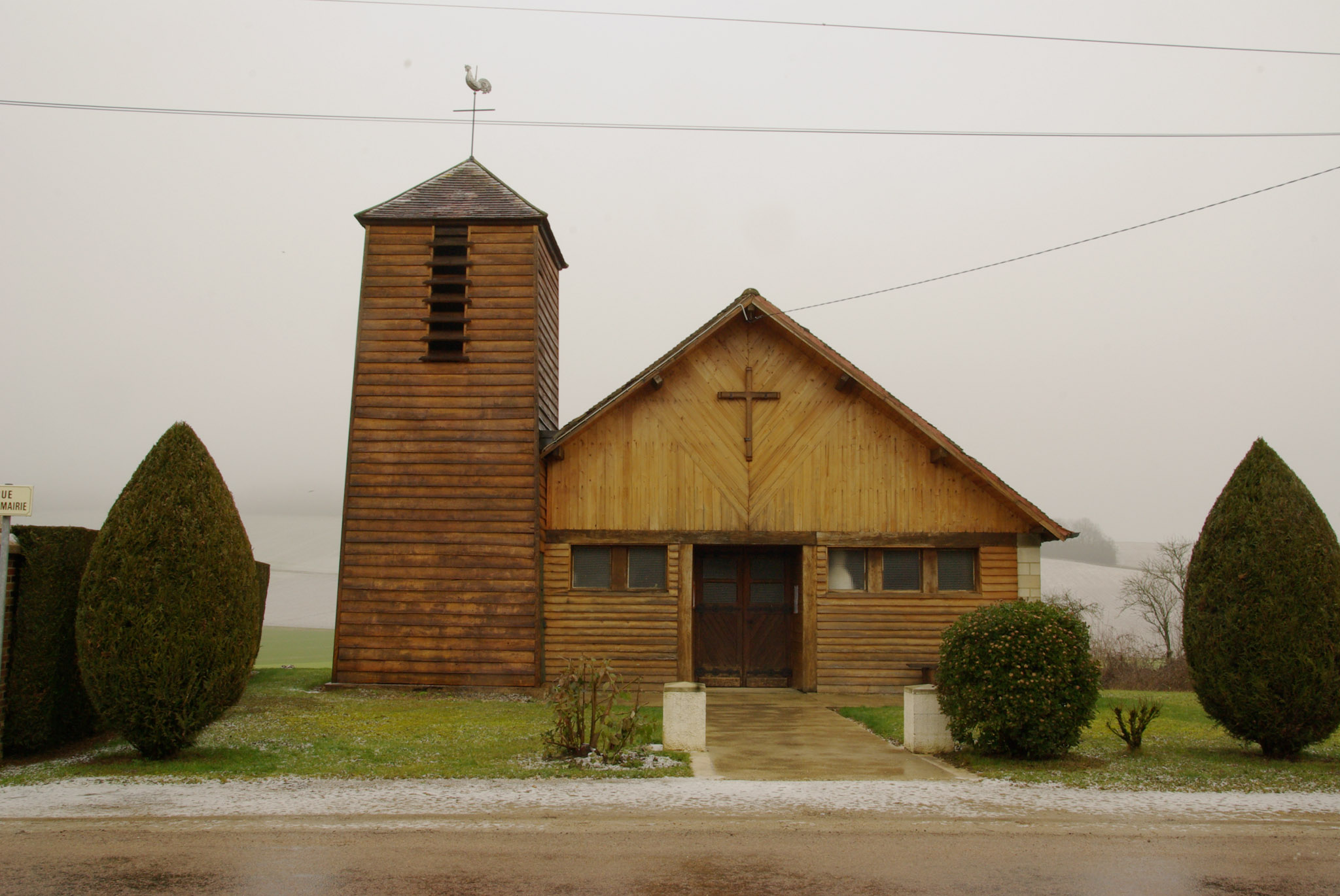 Église Saint-Blaise à Vosnon